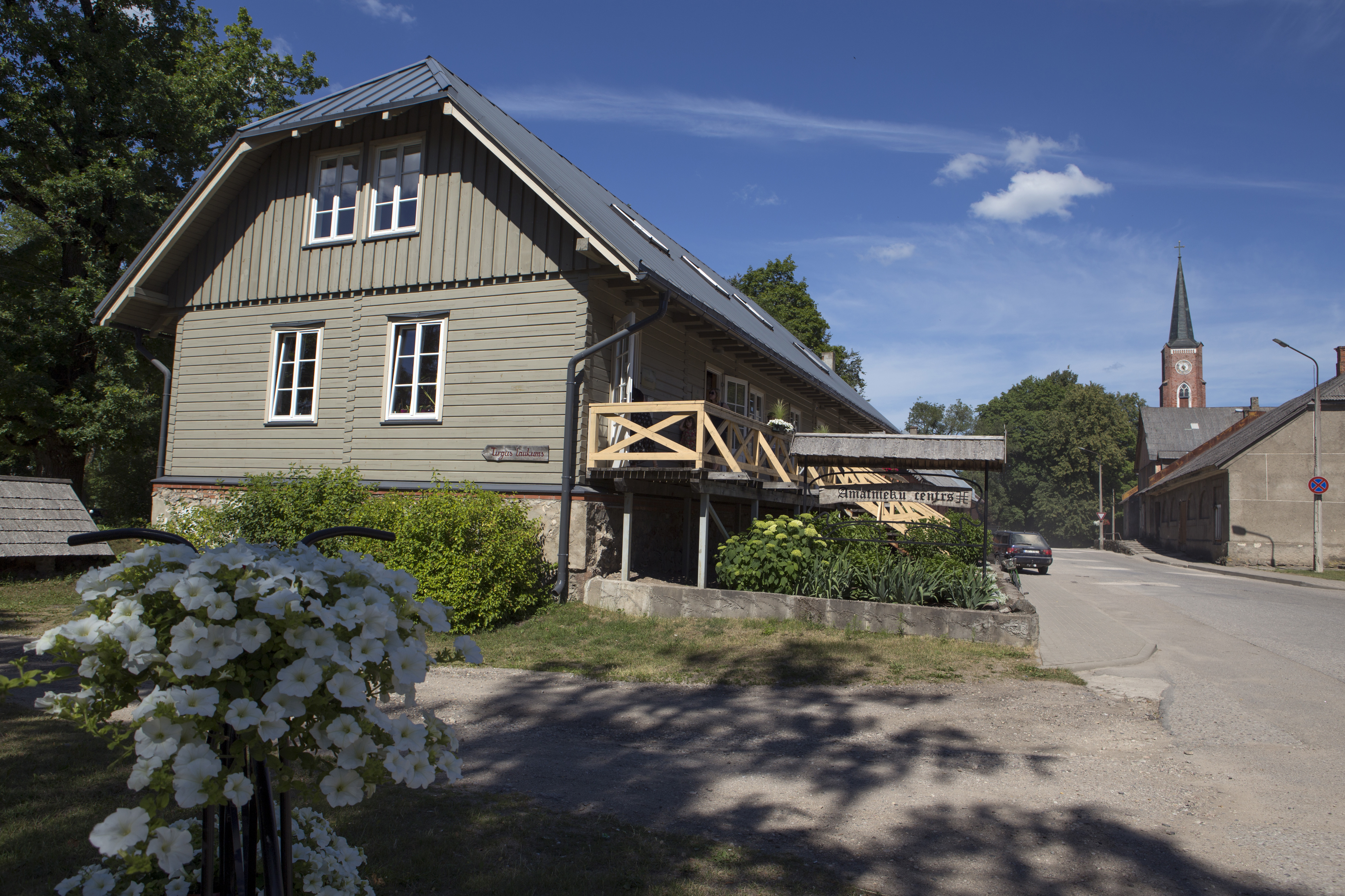 Lubānas pilsētas centrs